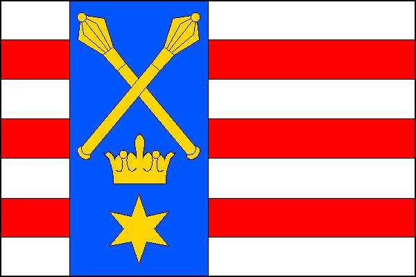 Vlajka obce Svojšín